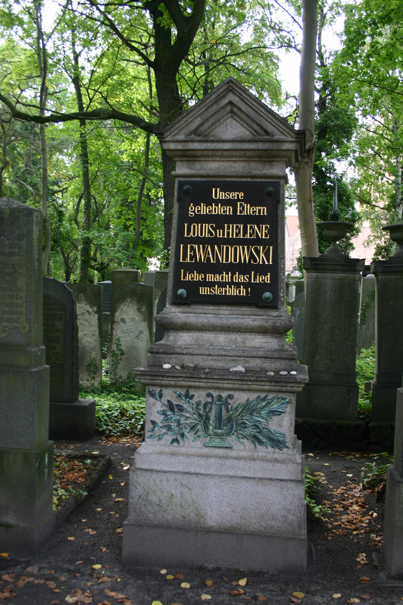 Grab des Komponisten Louis Lewandowski (1821-1894) auf dem Jüdischen Friedhof Berlin-Weißensee (Ehrenreihe).